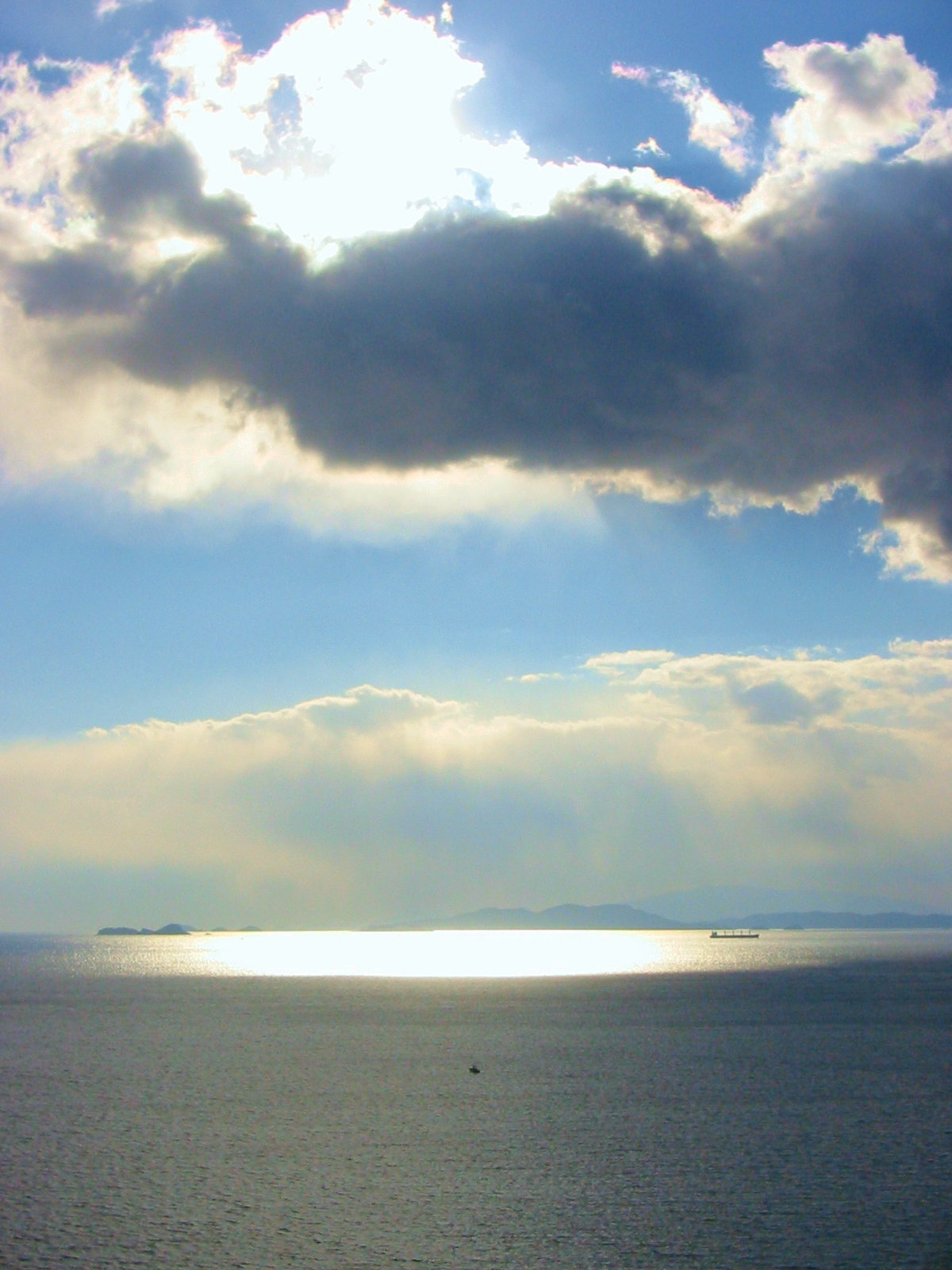 姫路市小赤壁公園。